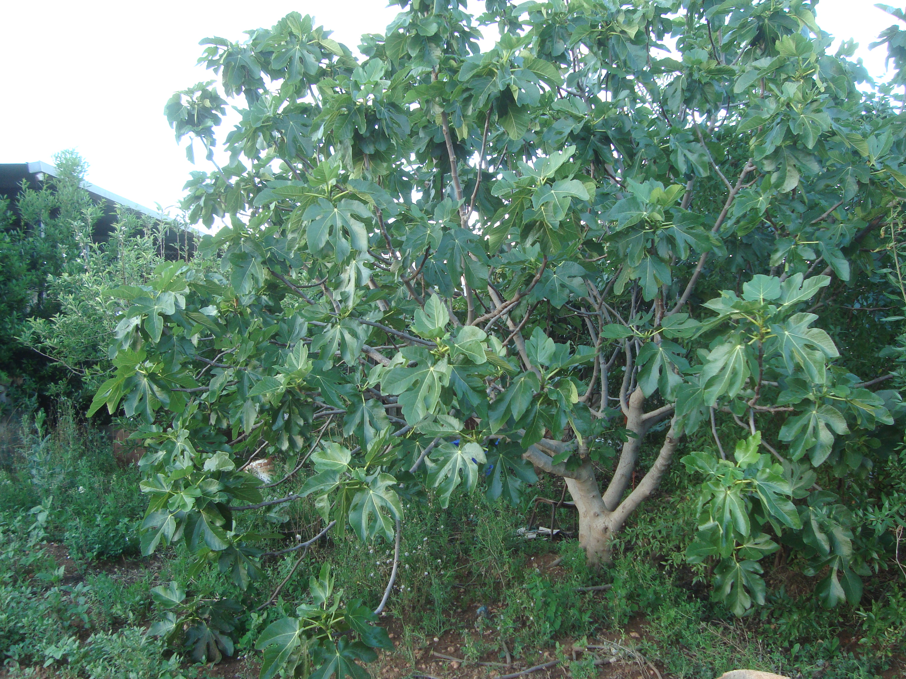 Ficus carica o higuera